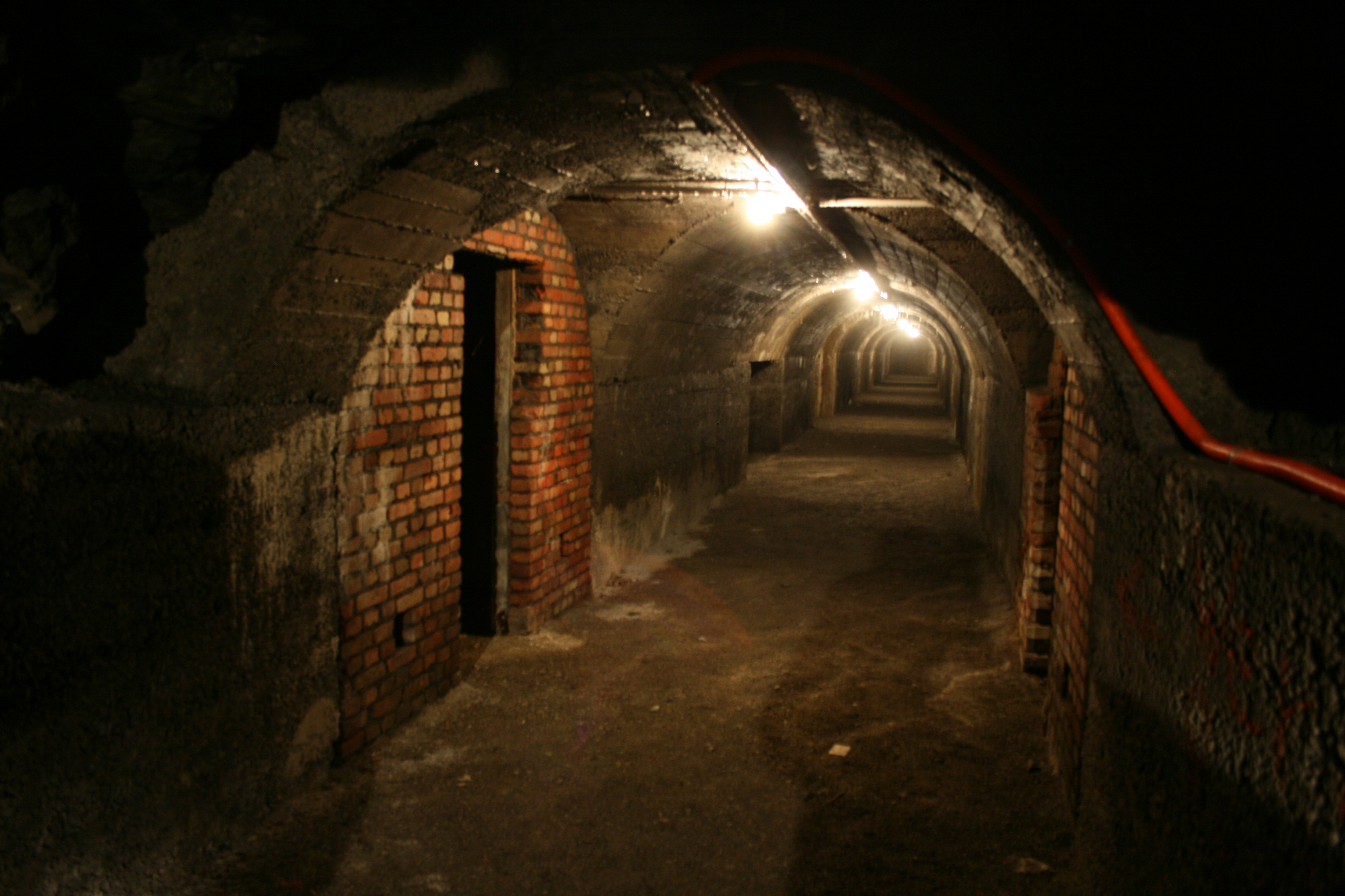 Ein Teilstück des Altstadtstollens in Iserlohn